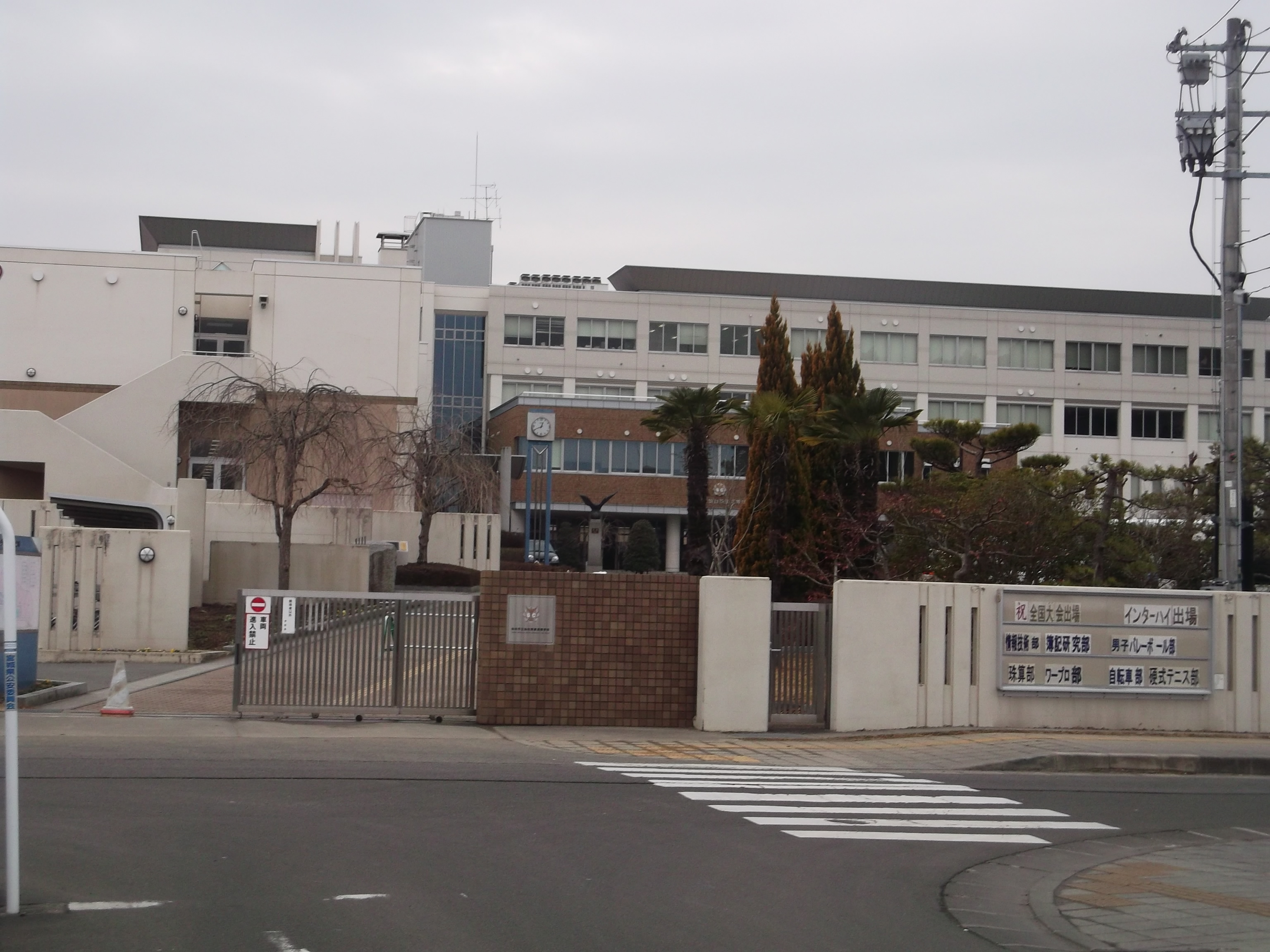 仙台市立仙台商業高等学校